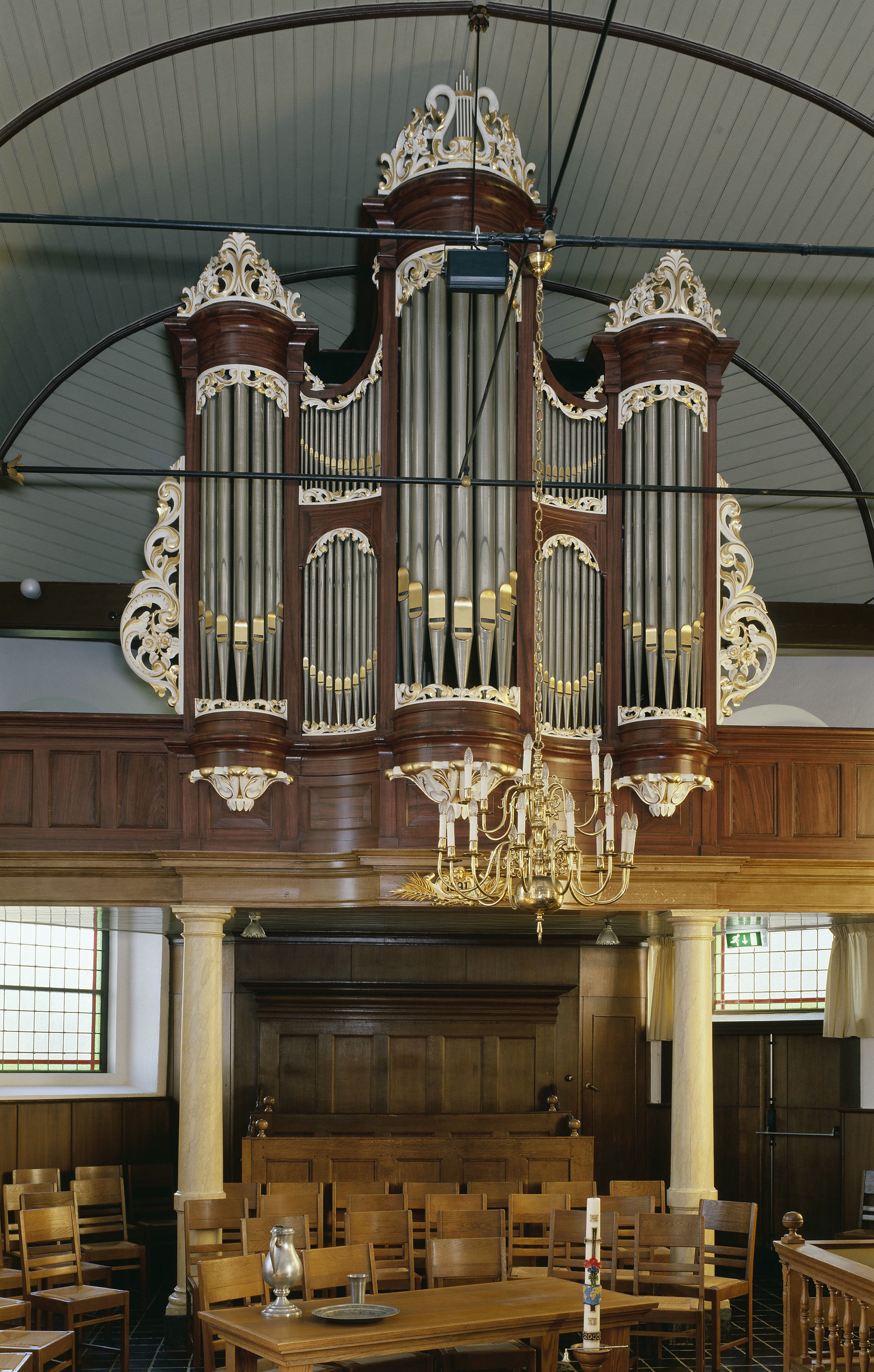 Nederlands Hervormde Kerk: Interieur, aanzicht orgel, orgelnummer 1264 (opmerking: Gefotografeerd voor Het Historische Orgel in Nederland 1886-1894, bladzijde 226)